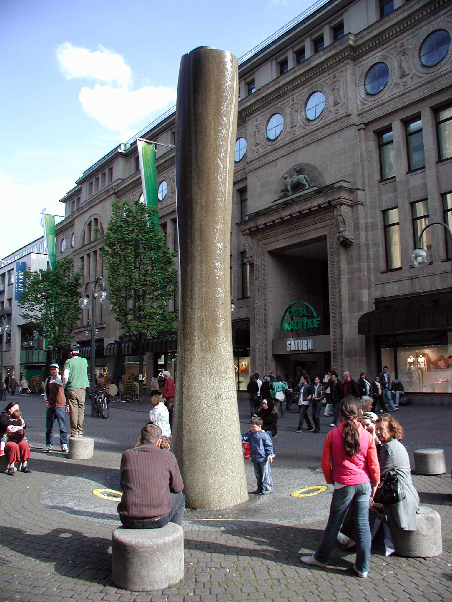 Kölner Bierbrunnen auf der Schildergasse. Entwurf und Realisation im Jahr 1972 durch den Künstler Harald Frehen., Schwalenberg